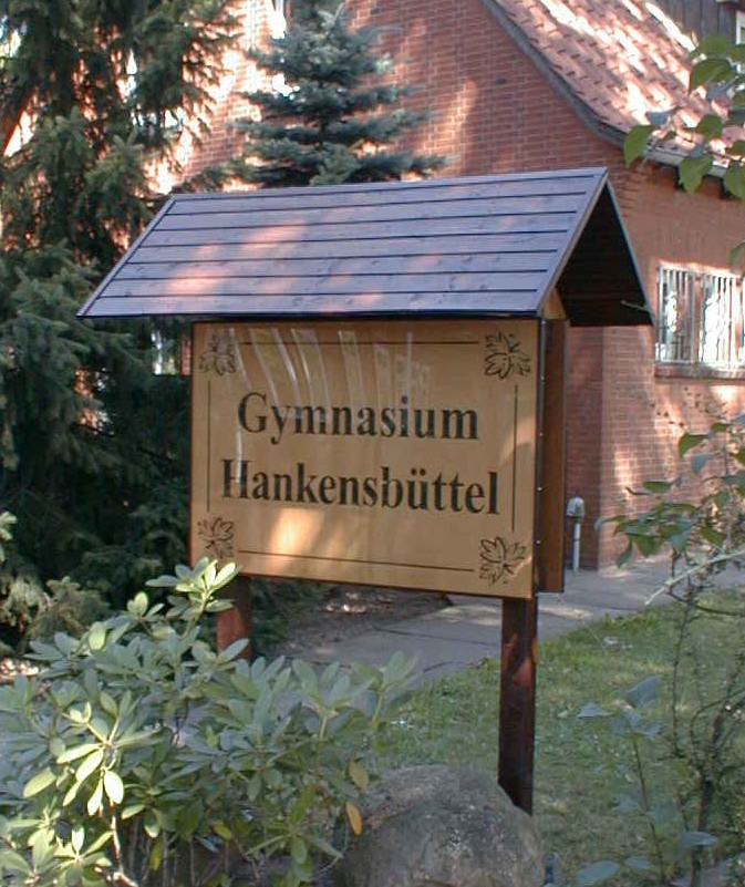 Eingangsschild des Gymnasiums Hankensbüttels, gestiftet vom Abiturjahrgang 1999 (SEKIIW).